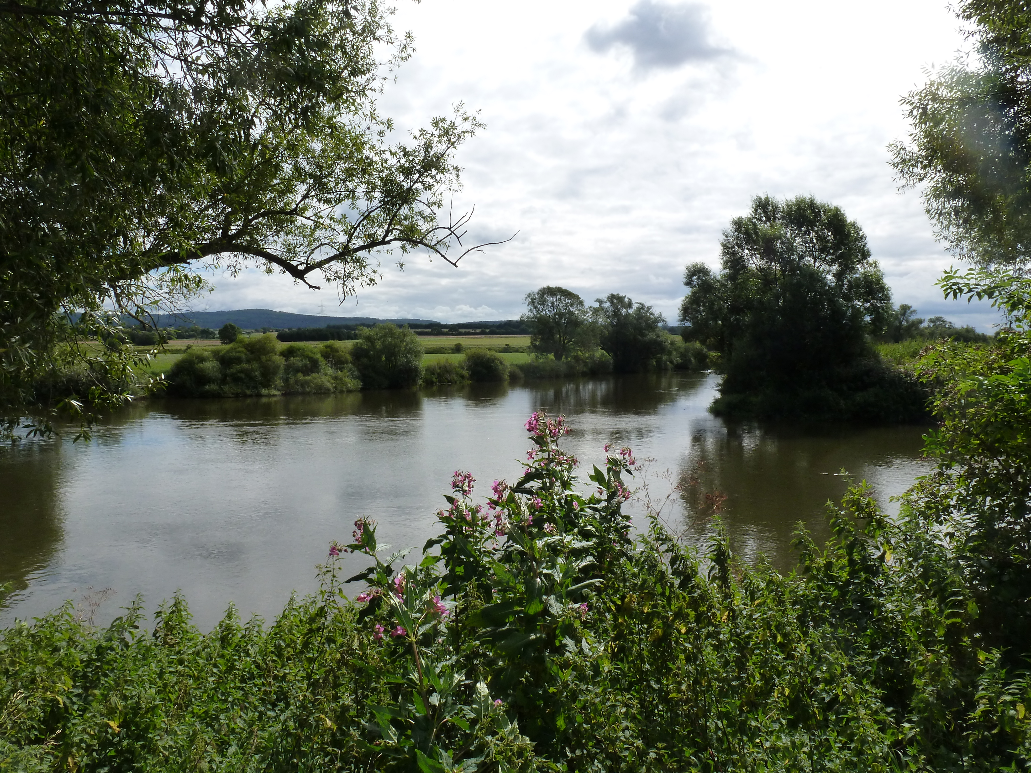 Die Eder (rechts) mündet in die Fulda (v. hinten rechts n. links)